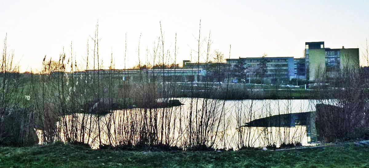 NRZ Bennewitz